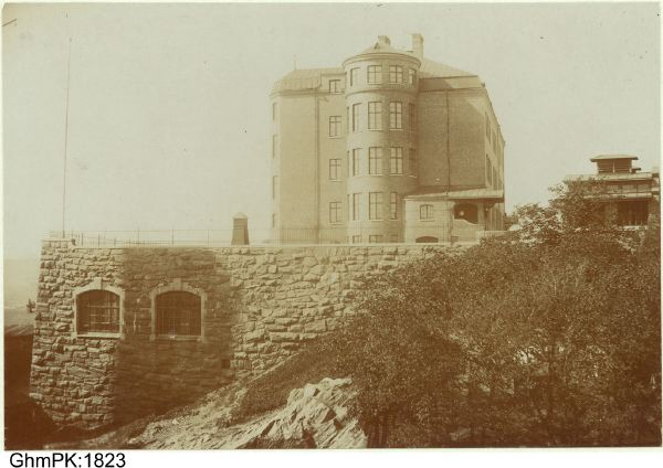 Otterhälleskolan 1915, Bildsamlingen, Göteborgs stadsmuseum.